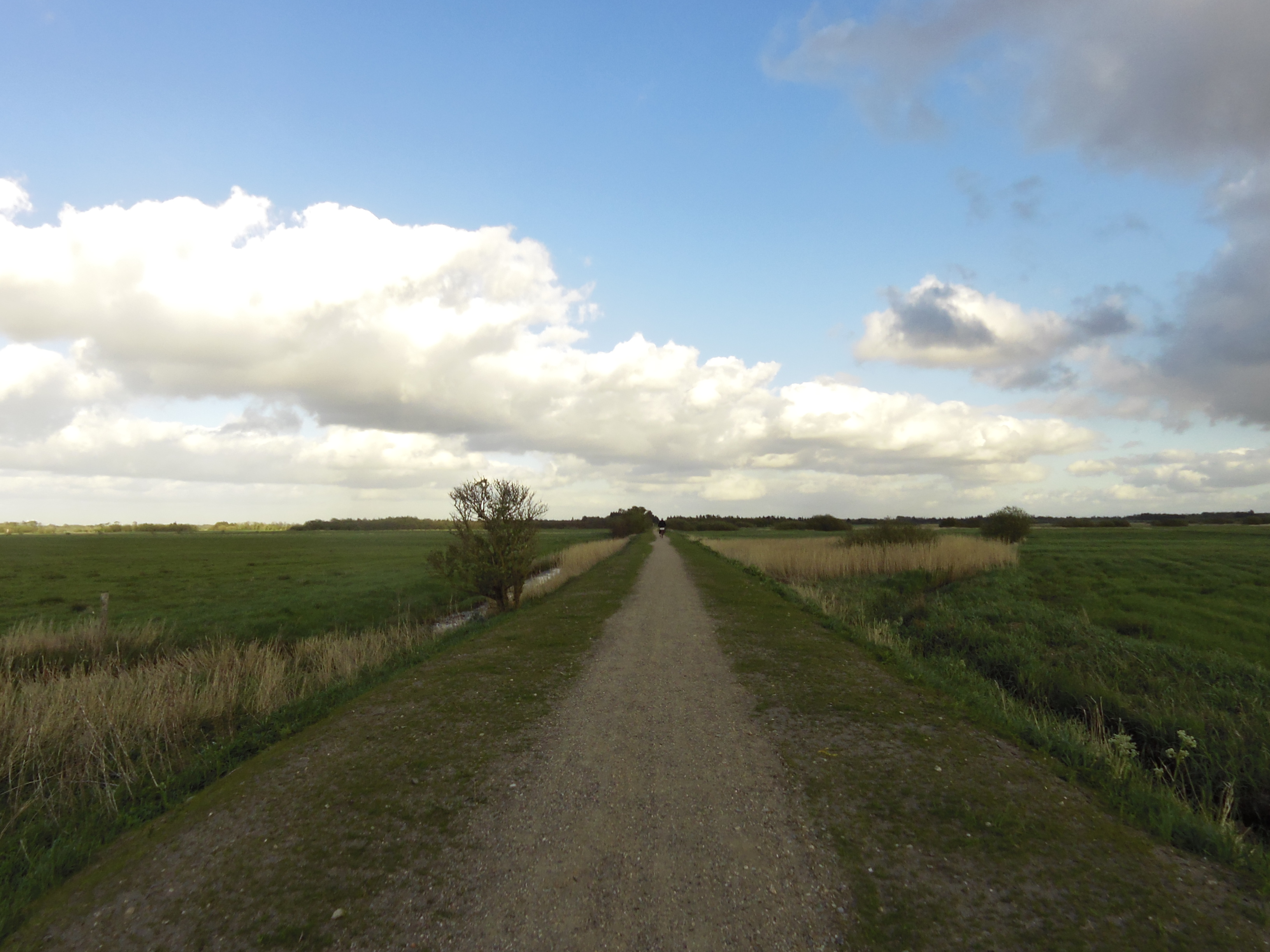 Varmingdiget i maj 2019